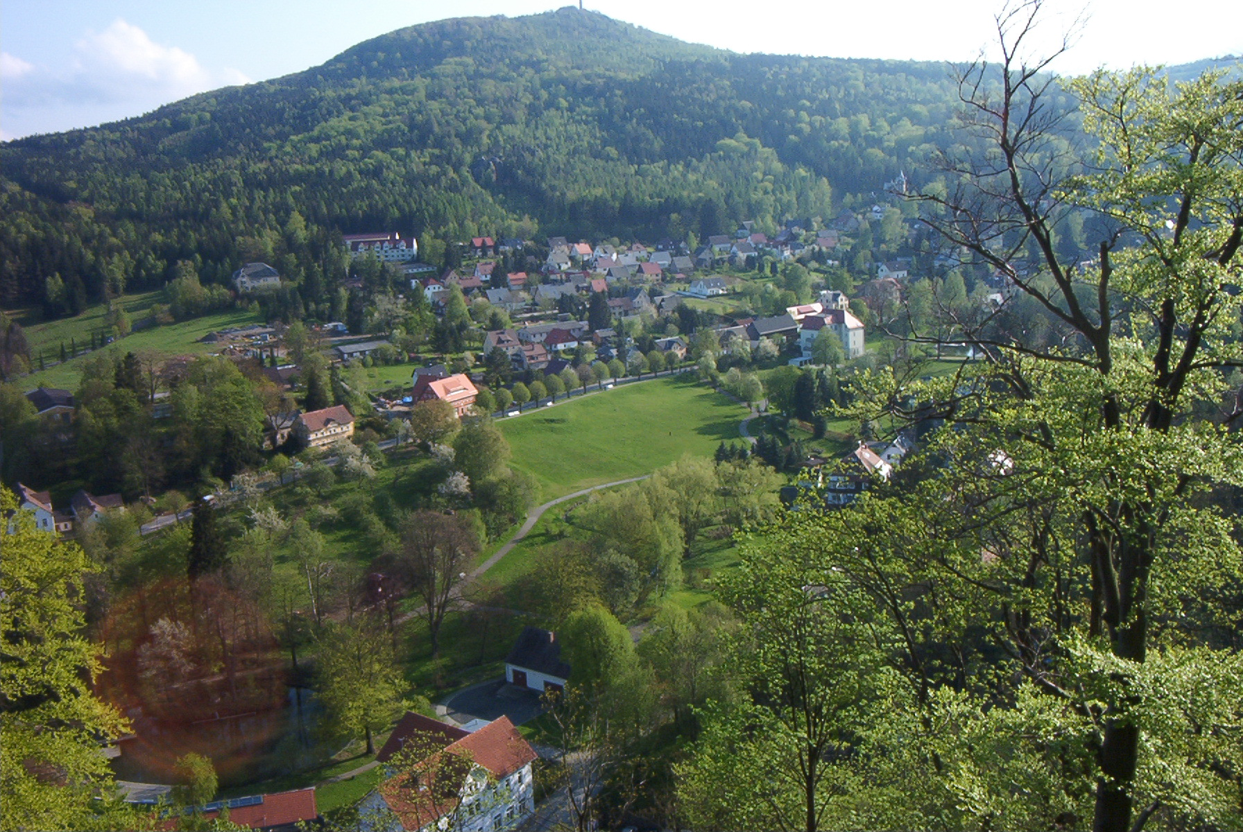 Ort Oybin vom Berg Oybin aus gesehen